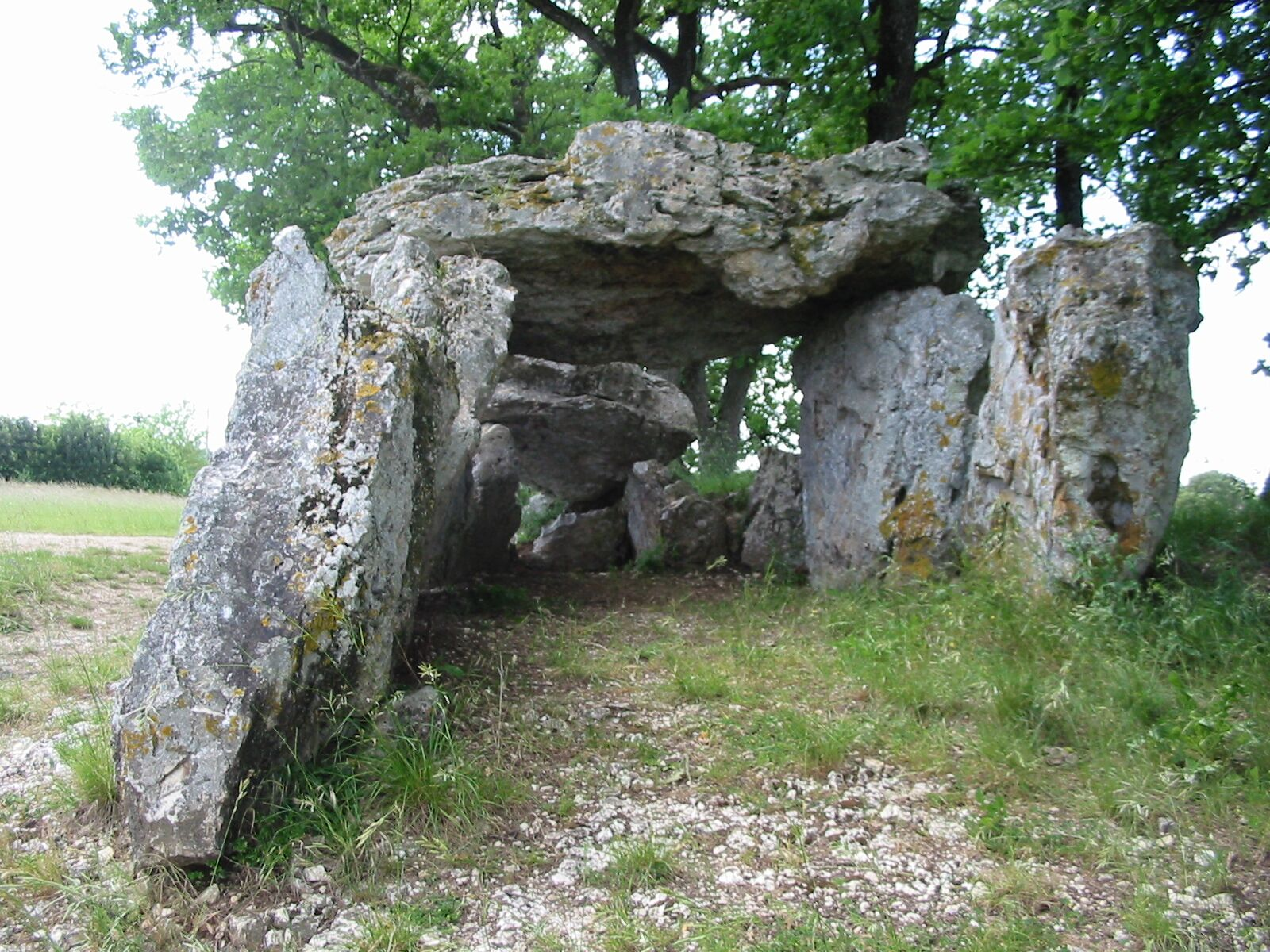 dolmen à Blanc, à Nojals-et-Clottes près de Beaumont-du-Périgord, sur la route de Villeréal, Dordogne, France